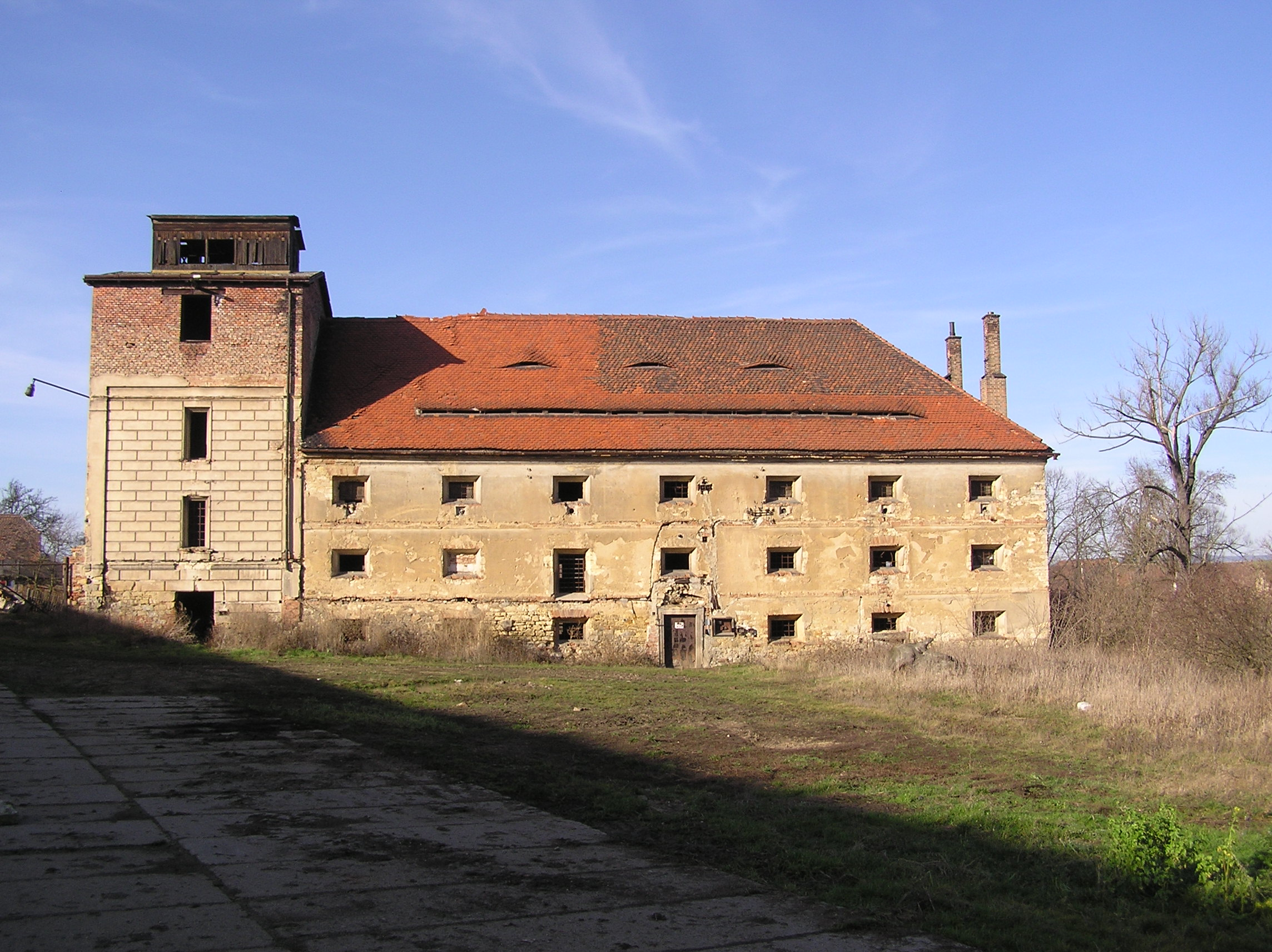 Velemyšleves (okr. Louny) - sýpka